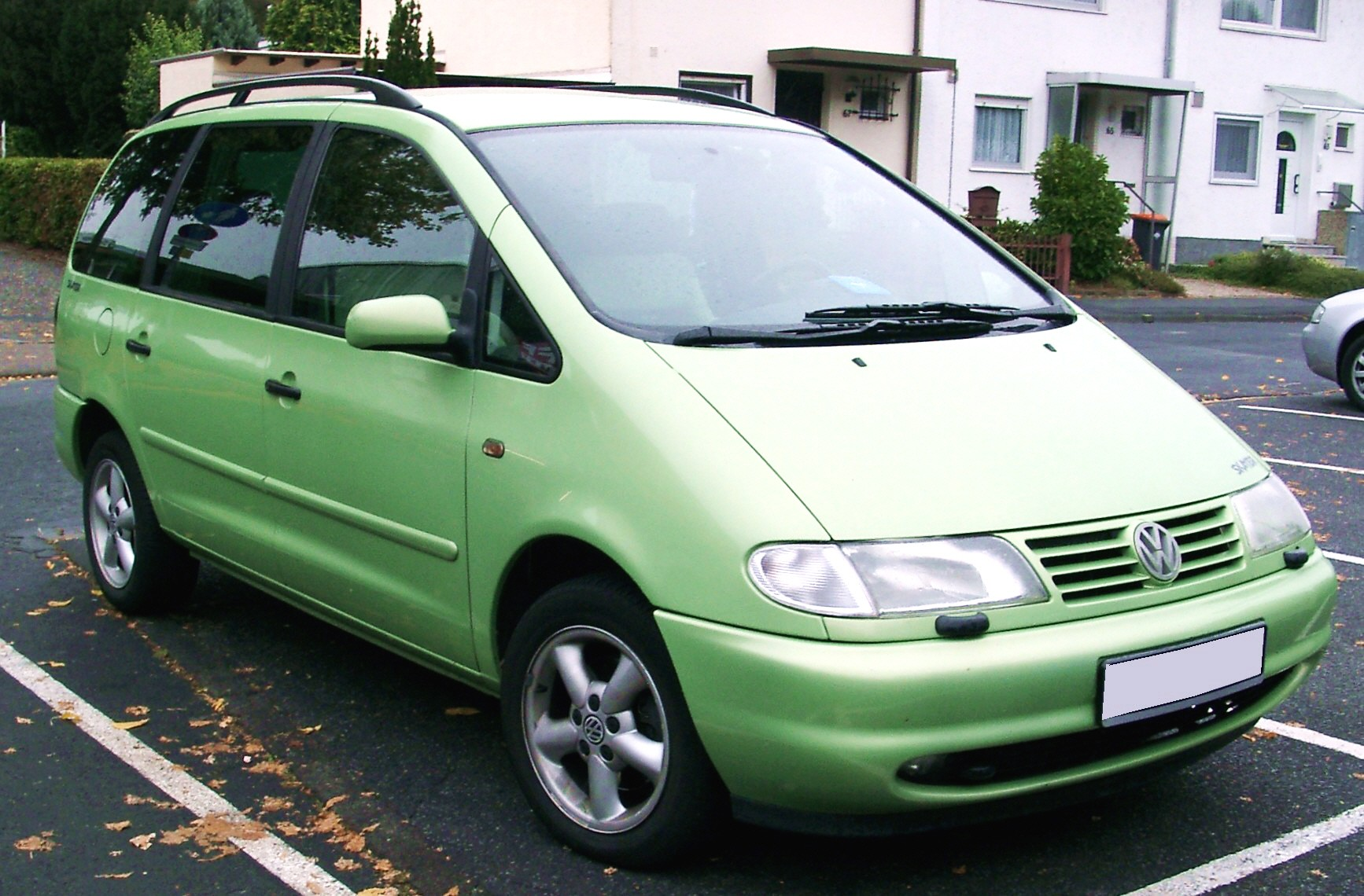 VW Sharan, Sondermodell Skater